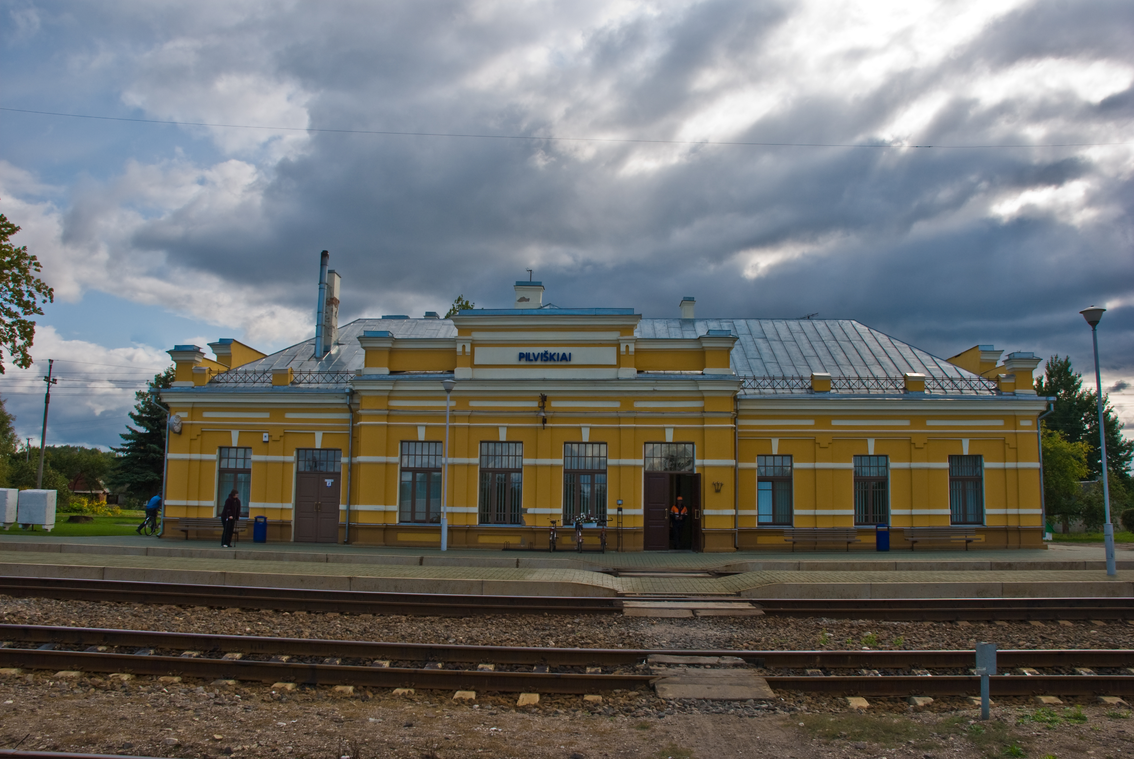 Pilviškiai railway station